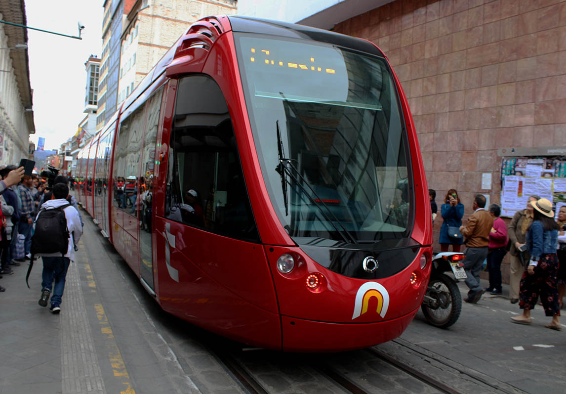 El Tranvía de Cuenca (Ecuador) durante un recorrido de prueba el 27 de julio de 2018.